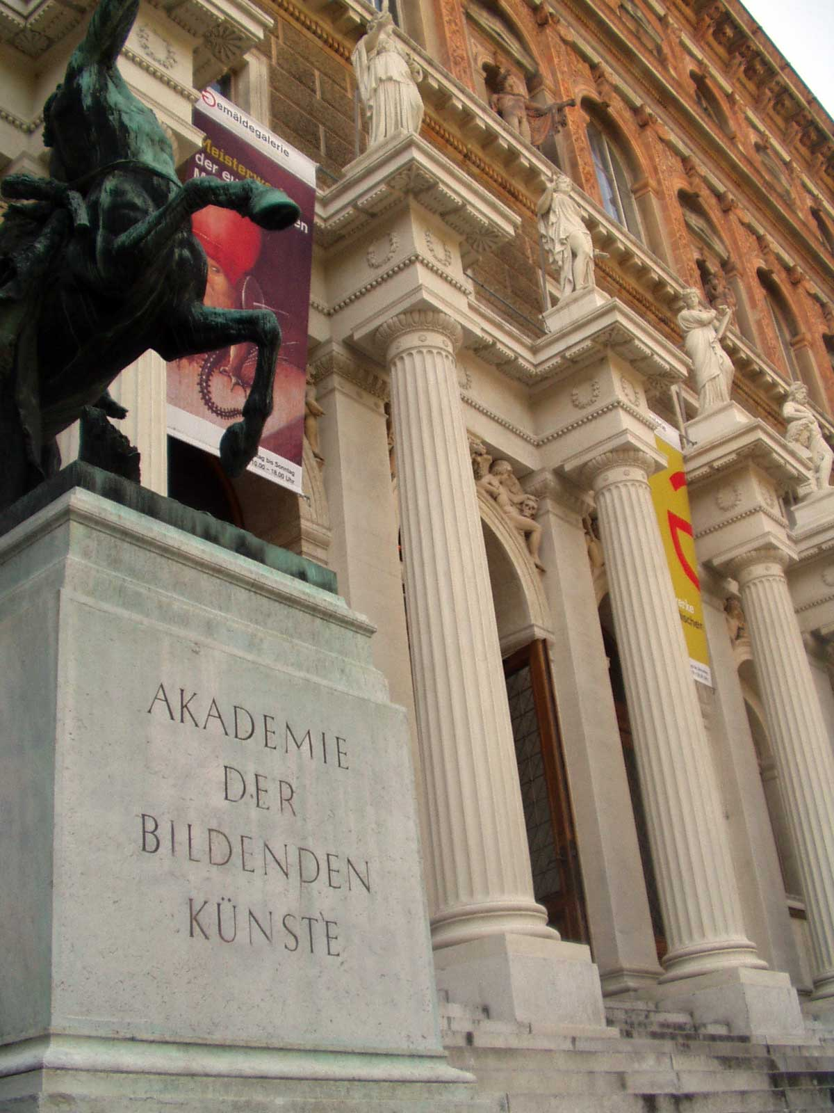 Façade of the Akademie der Bildenden Künste, Wien (Vienna)